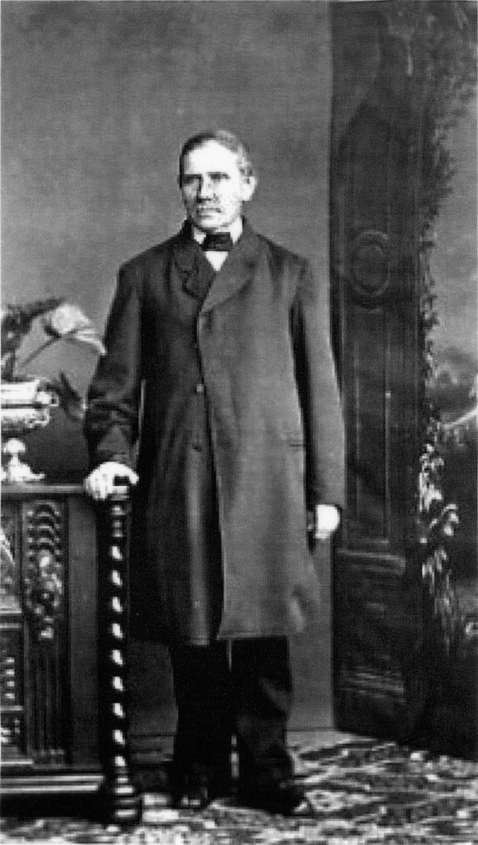 Anton Friedrich Remmers, Gründerpersönlichkeit des deutschen Baptismus